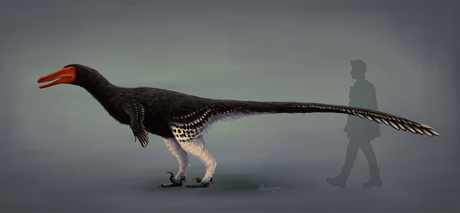 Austroraptor reconstrucción 2020